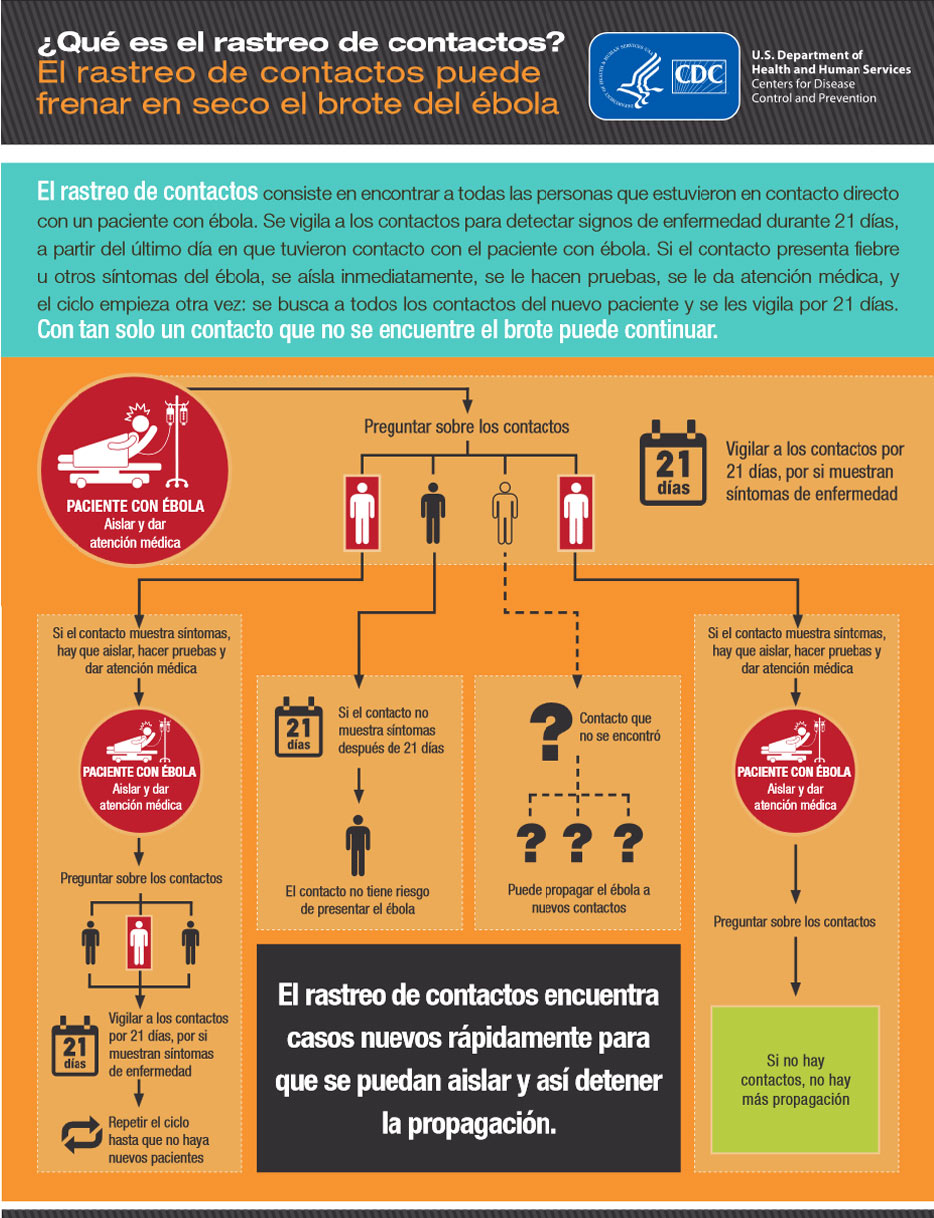 Infografia sobrfe el rastreo de contactos del virus Ebola del CDC de Estados Unidos de América